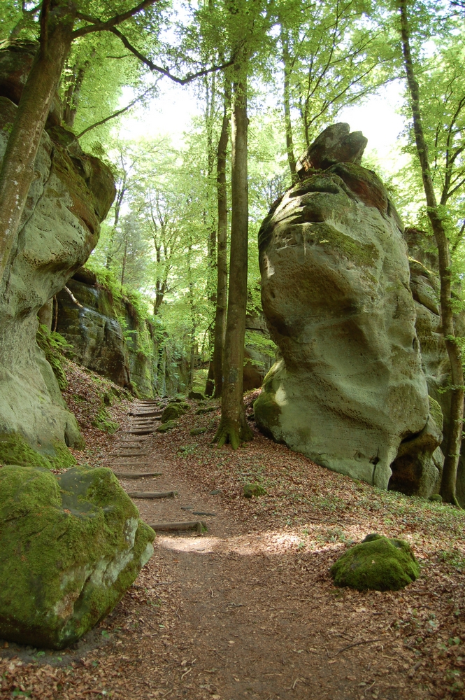 Das Labyrinth im Müllertal This photograph was taken with a Nikon D50.